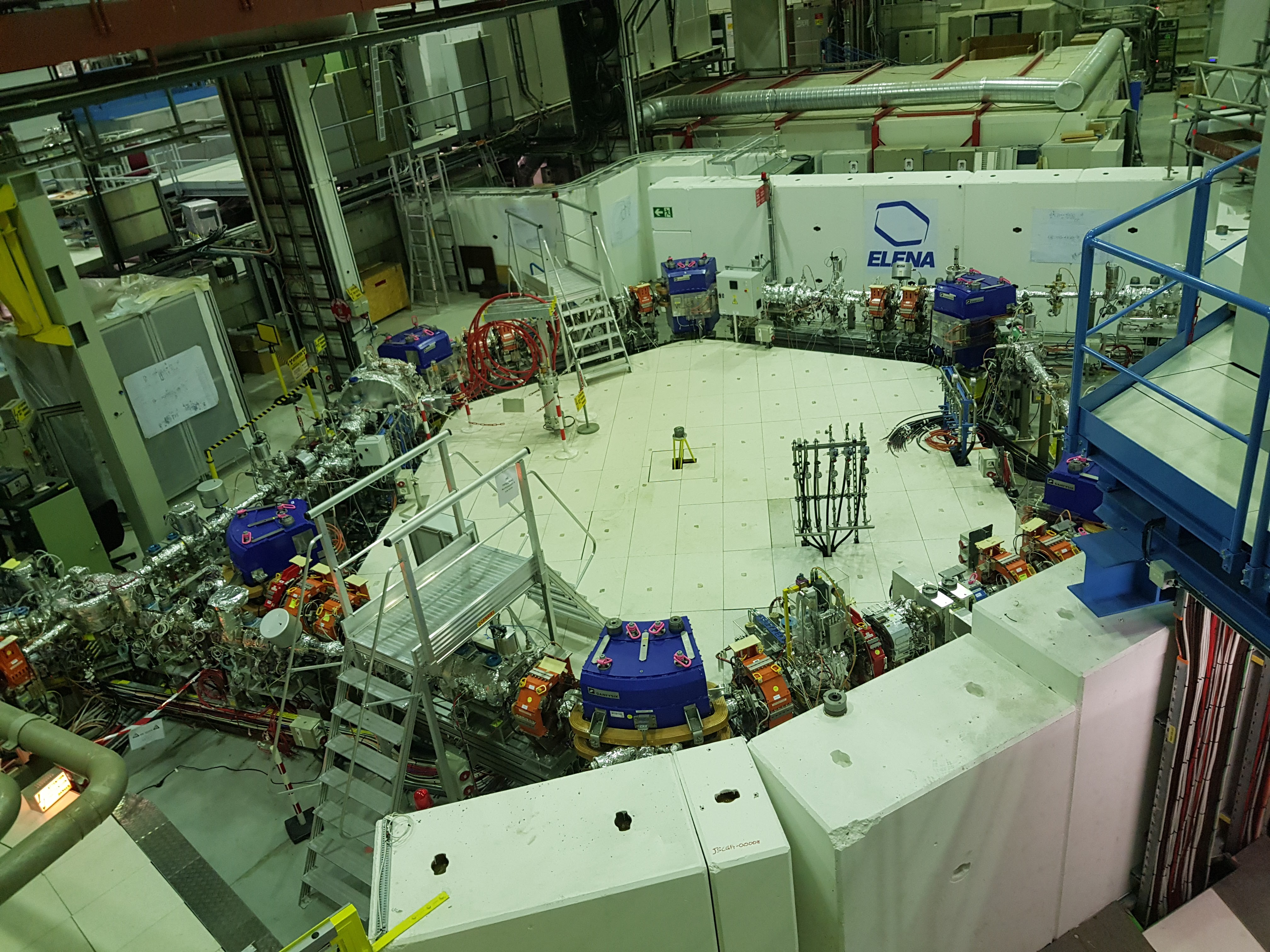 תהליך יצירת האנטי חומר